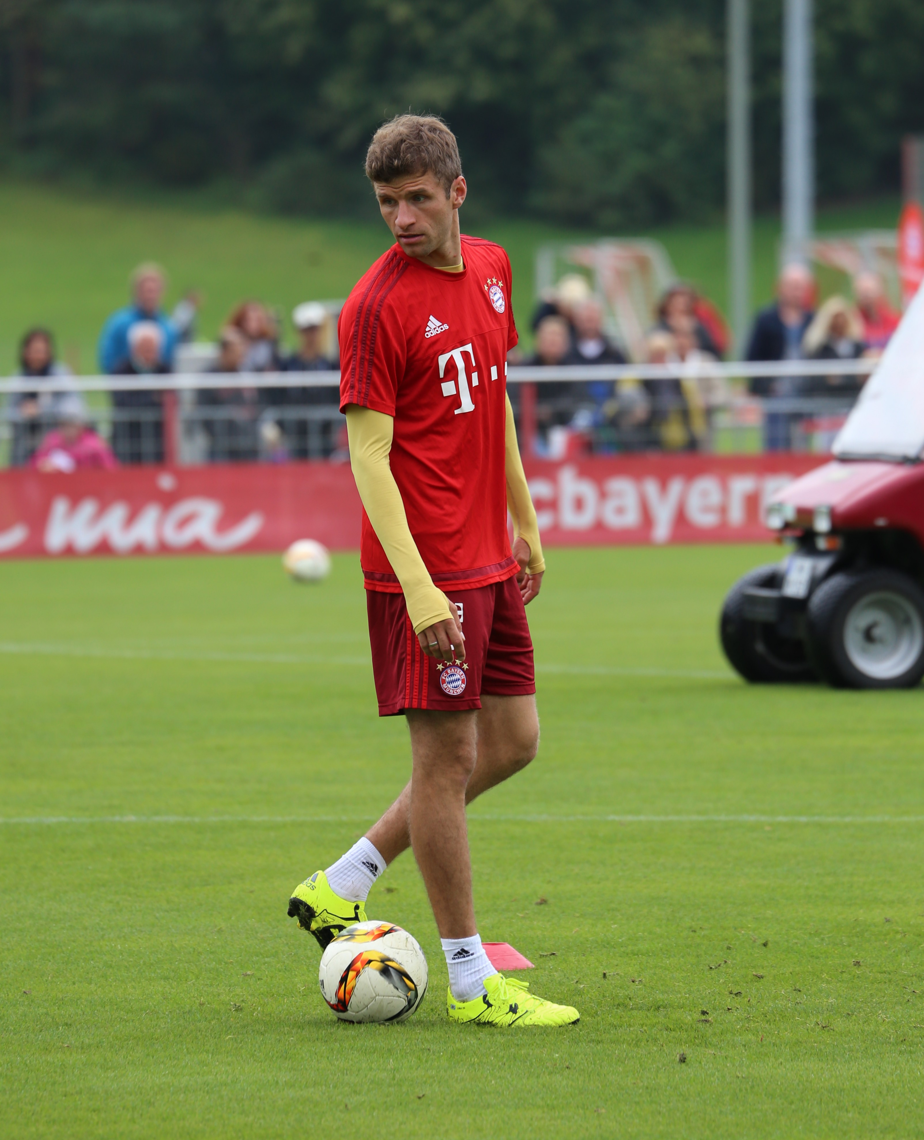 Thomas Müller beim Training auf dem Gelände des FC Bayern München.